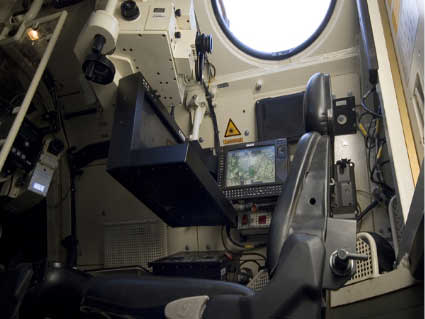 Interno del PzH, italian army